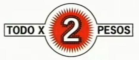 Logo de la primera temporada del programa Todo por dos pesos, emitido por canal 9 "Azul" en Buenos Aires, durante 1999.